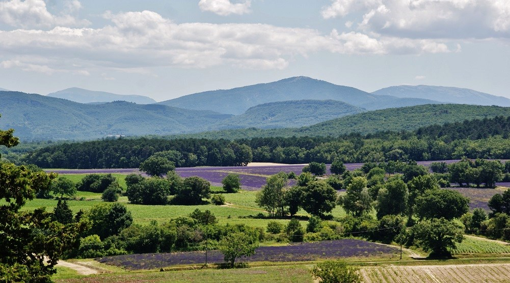 Puygiron et ses champs de Lavande